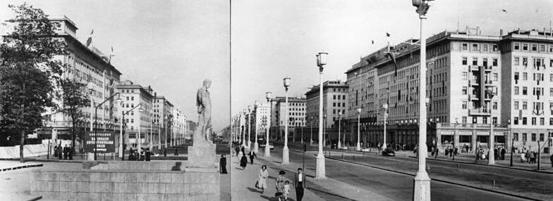 Zentralbild Weiss 5.5.1953 Die Stalinallee in Berlin im Mai 1953 UBz: Blick von der Deutschen Sporthalle nach Osten. Rechts: Block C-Süd, links Block C-Nord